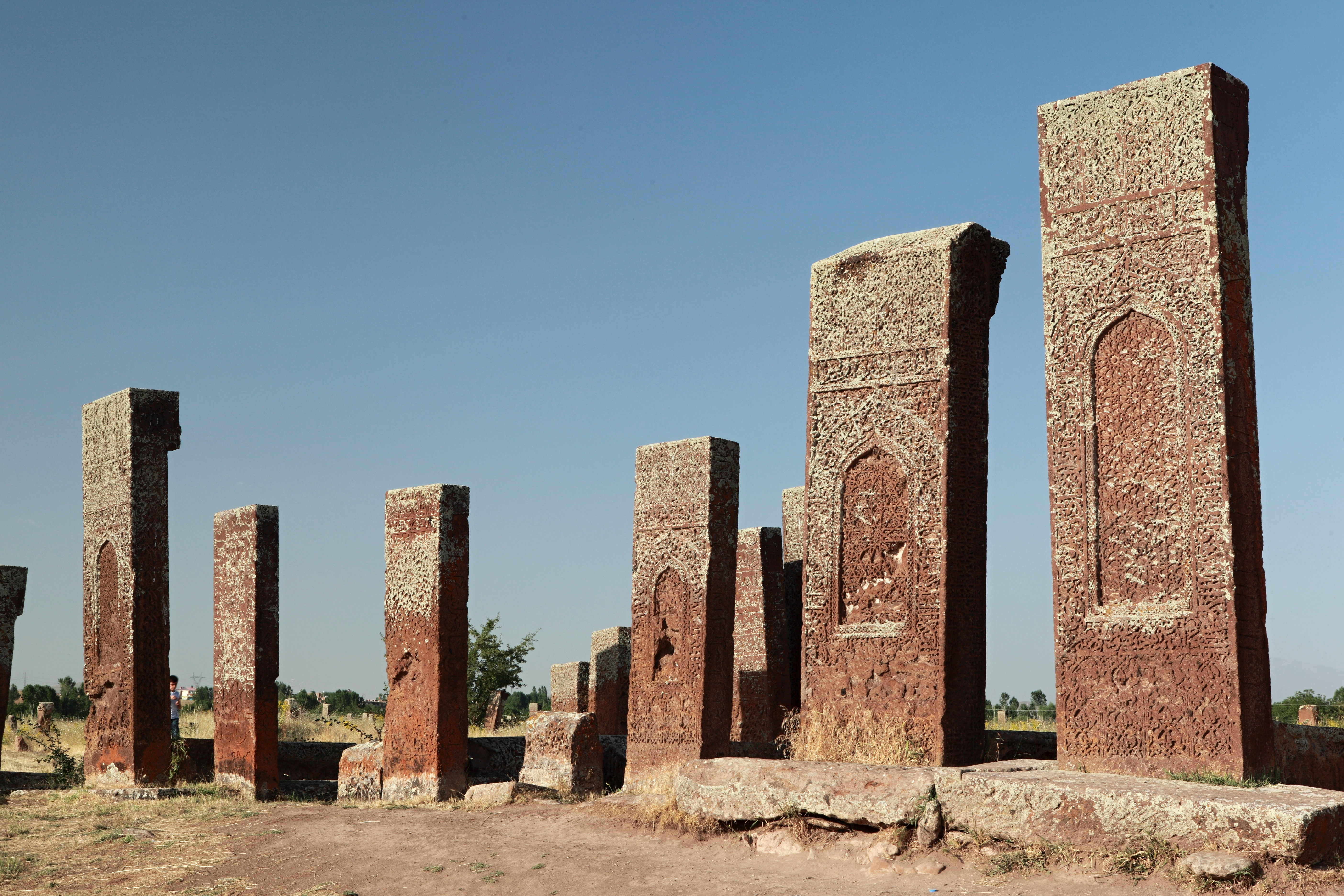 Seldžucký hřbitov v Ahlatu